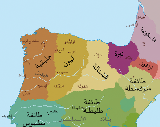 خارطة سياسيَّة لشمال غرب شبه الجزيرة الأيبيريَّة في نهاية القرن الحادي عشر الميلاديّ.